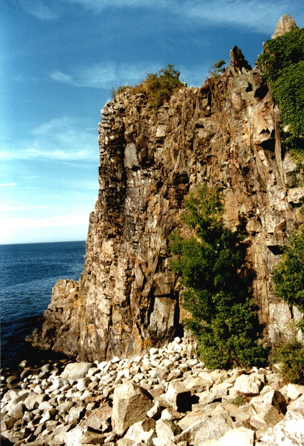 Abbruch der Granitfelsen in die Ostsee bei Jons Kapel (Bornholm). Eigene Fotografie vom August 1997.